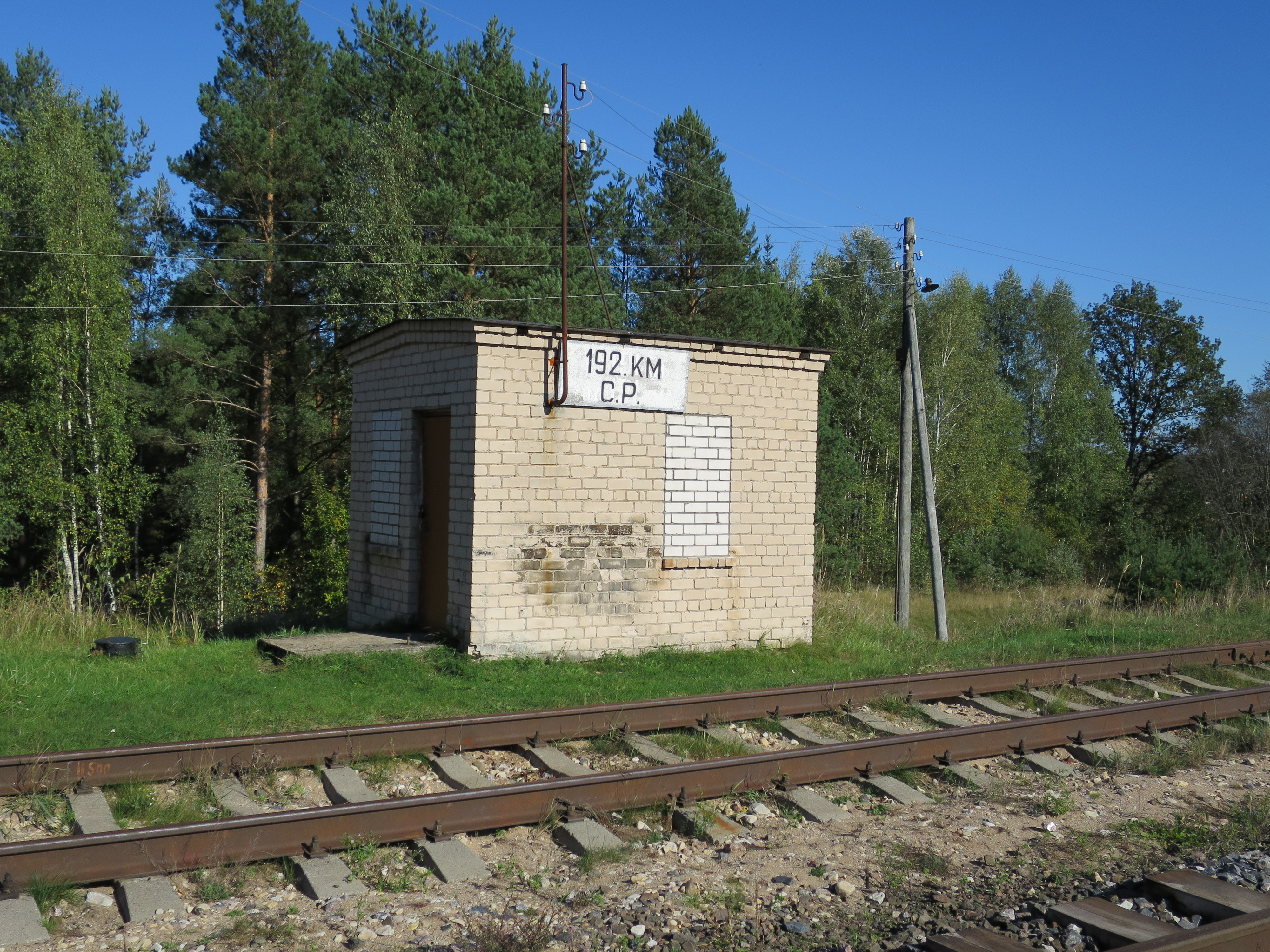 192. kilometra ceļa posteņa ēka